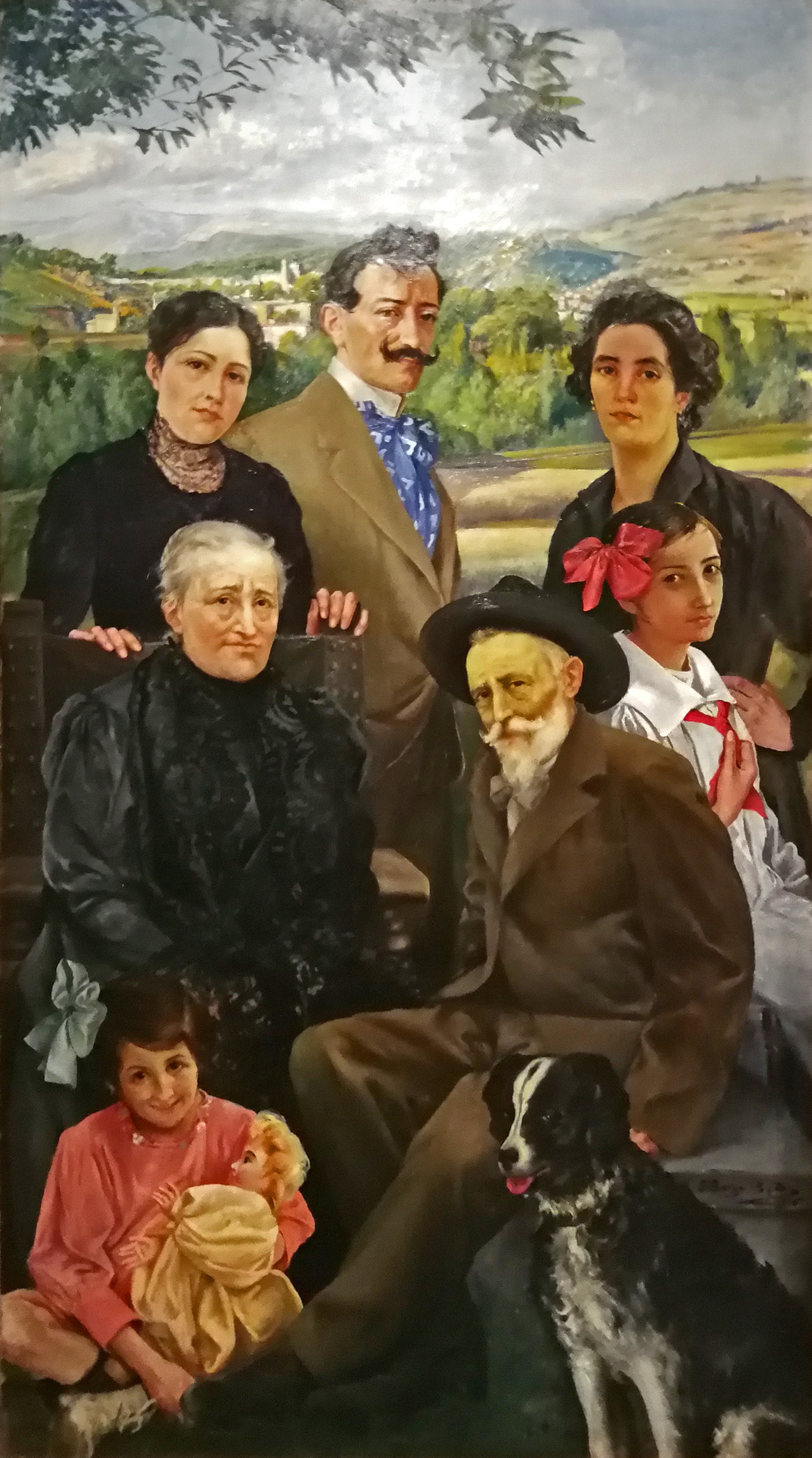 Josep Berga i Boada: Bildnis der eigenen Familie (Vorne Vater Josep Berga i Boix und Mutter, hinten Josep Berga i Boada und Frau und Schwester und die beiden Töchter). Das Bild befindet sich im Museum Comarcal de la Garrotxa in Olot. Es wurde während der Ausstellung Josep Berga i Boada in der Sala Oberta des Museums fotografiert. Standort: Museu Comarcal de la Garrotxa, Olot